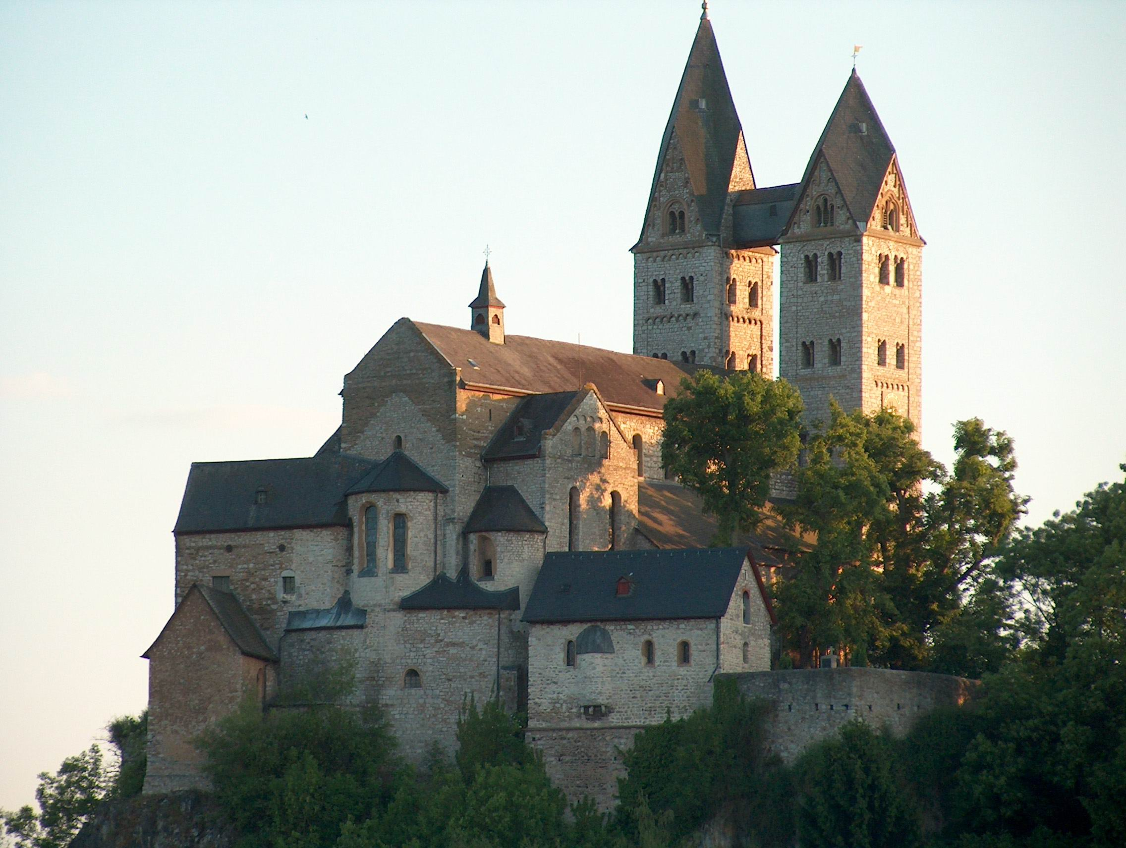 St. Lubentiuskirche von Dietkirchen. Selbst fotografiert von Ludwig Ries am 29.05.2004, Lizenzart GNU-FDL